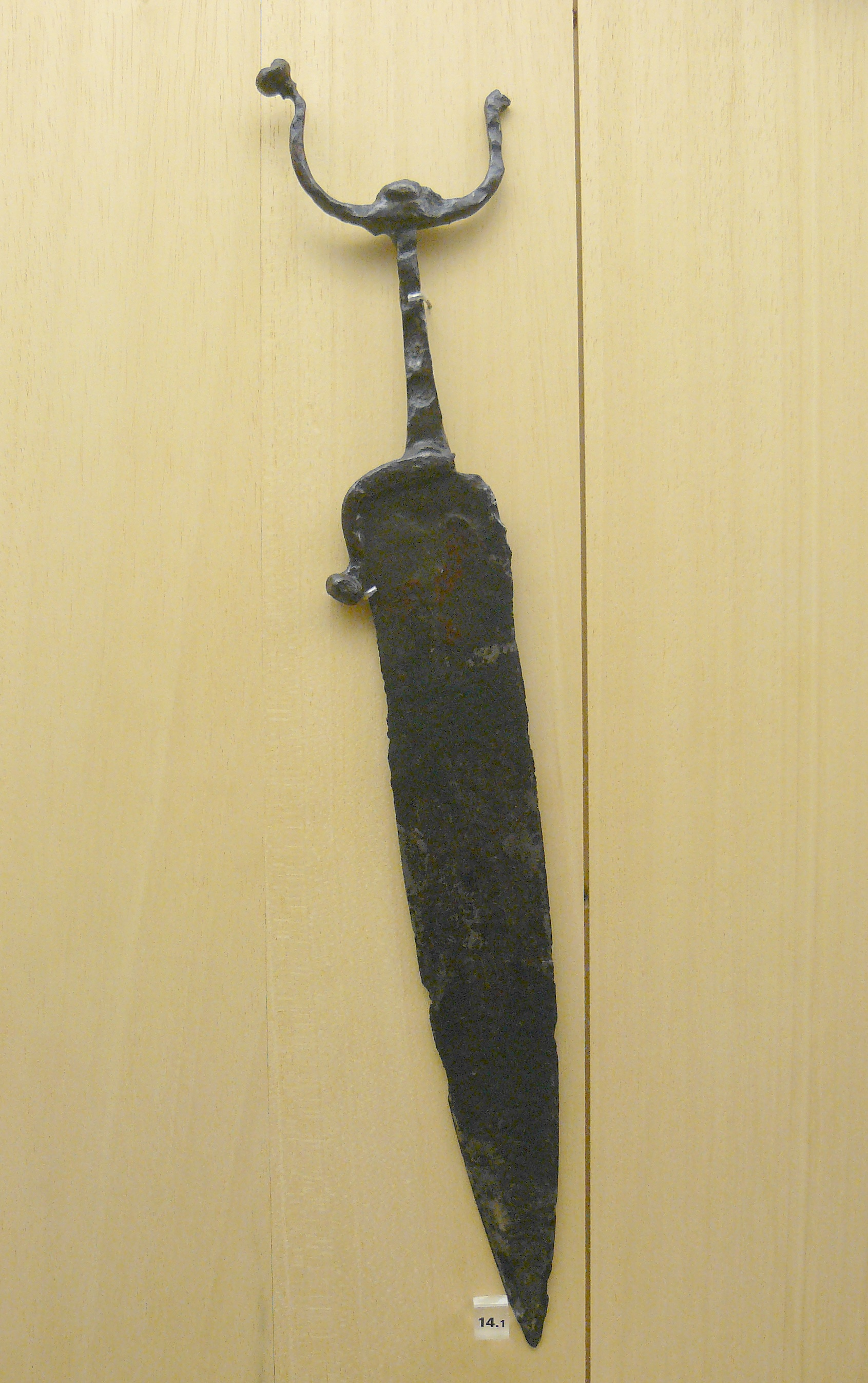 Poignard à antennes en fer trouvé dans un dragage de rivière (1964-1965) - Datation vers le VIe siècle avant notre ère - Musée de Antiquités nationales de Saint-Germain-en-Laye, n° Inv. MAN 82 885